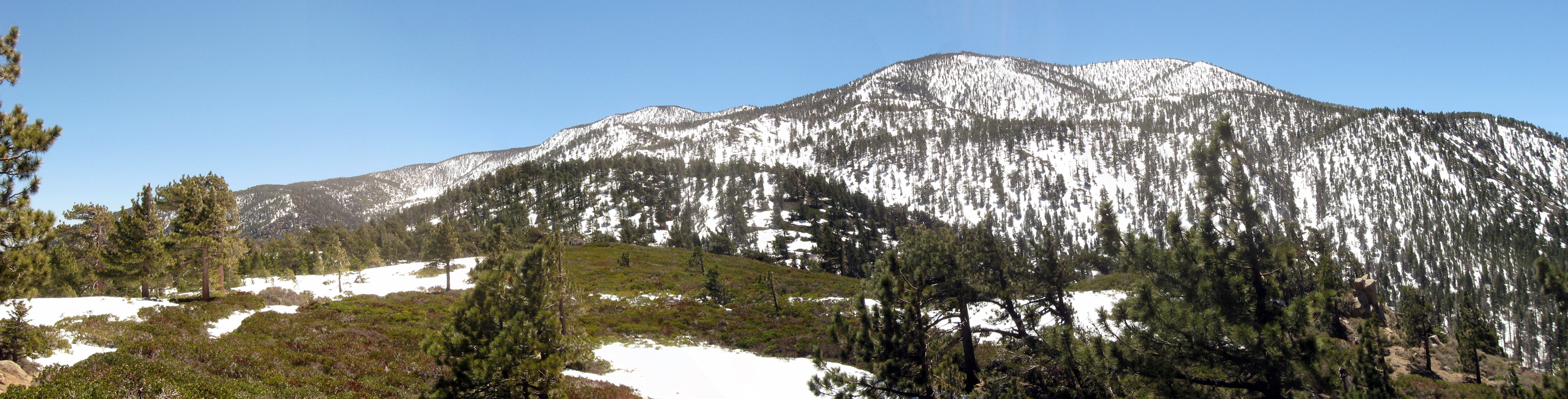 Elevation 10,649 feet.